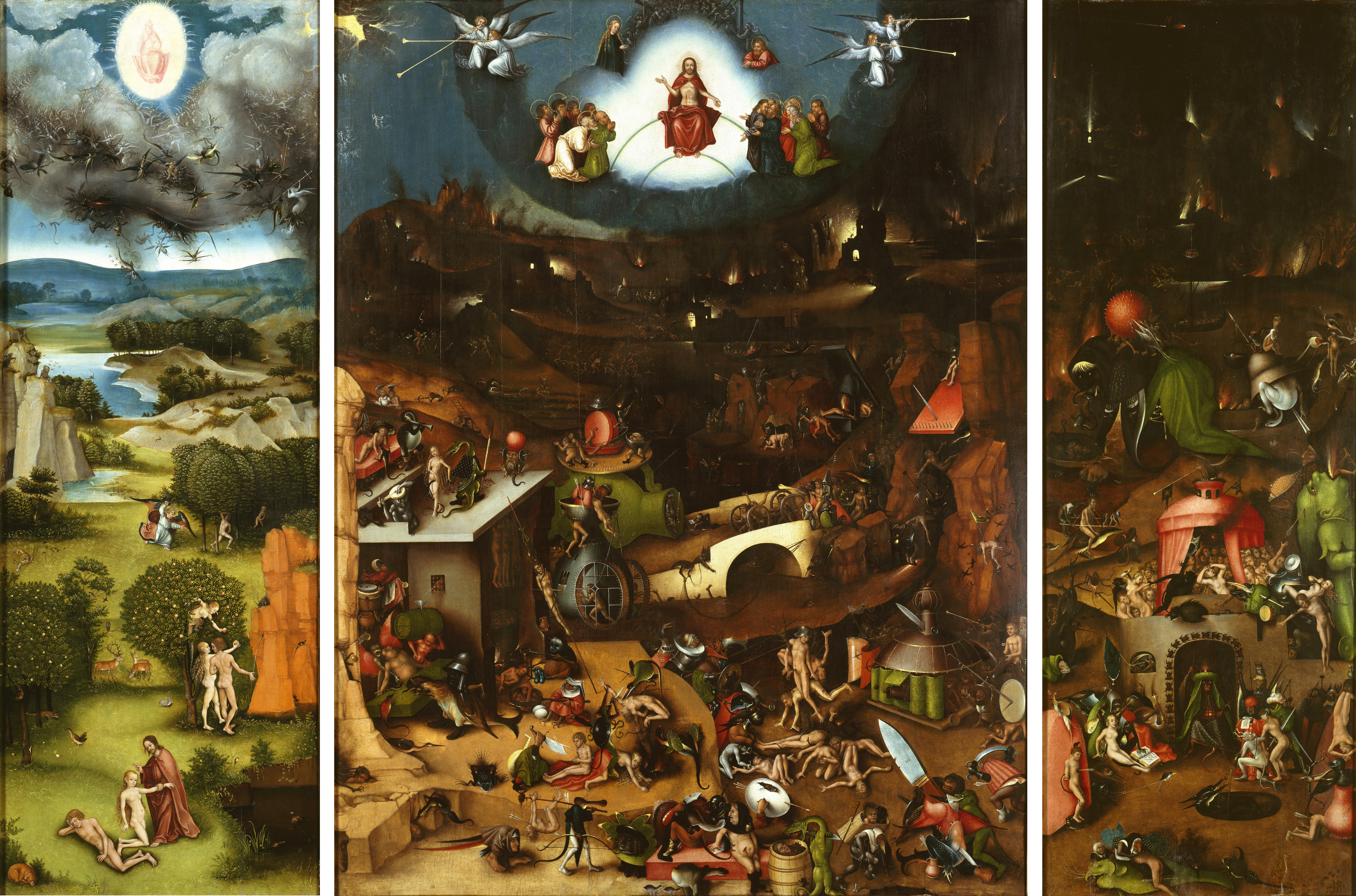 Flügelaltar mit dem Jüngsten Gericht, Schauseite